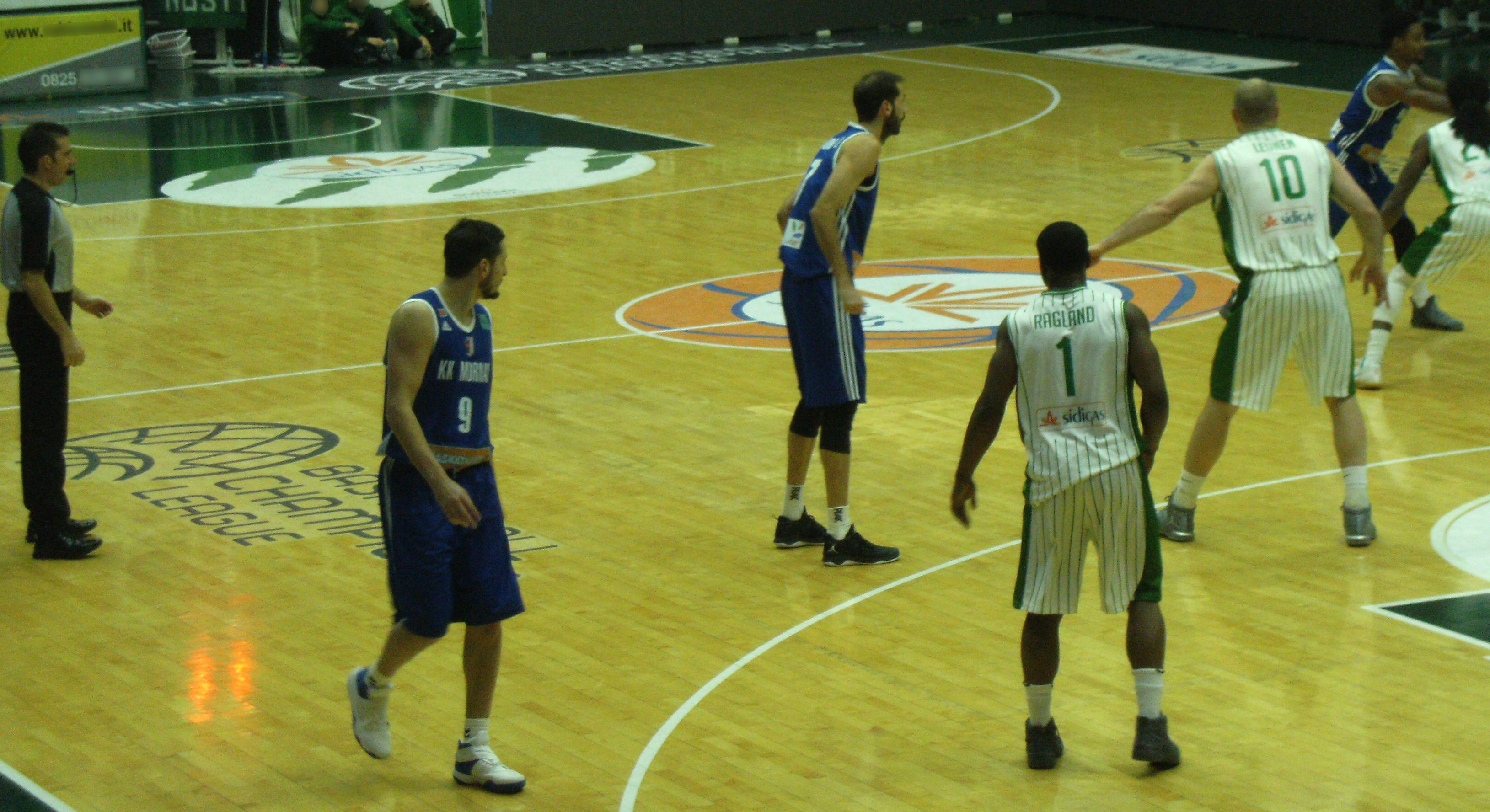 Fase di gioco di Società Sportiva Felice Scandone - Košarkaški klub Mornar Bar (53-60) Palasport Giacomo Del Mauro di Avellino 11/01/2017 Regular Season Basketball Champions League 2016-2017